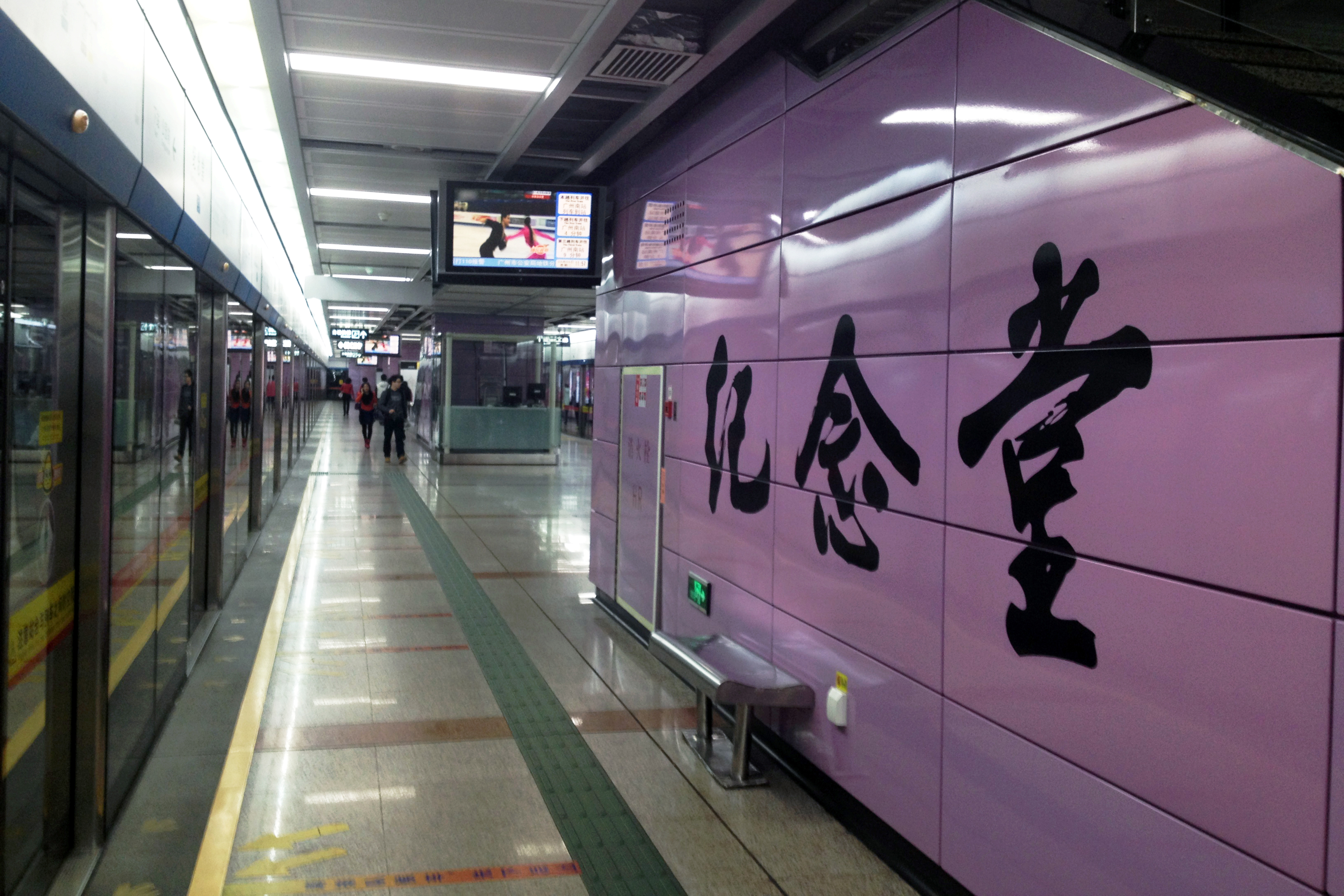 广州地铁纪念堂站月台（广州南站方向）